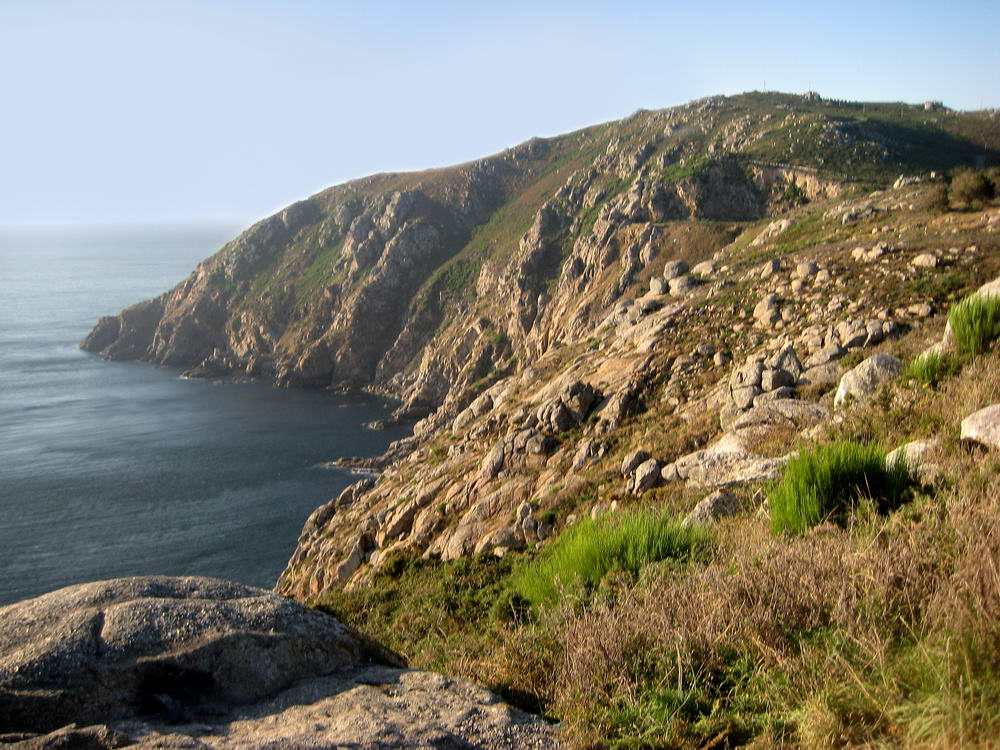 Fisterra, Galicia, Spain